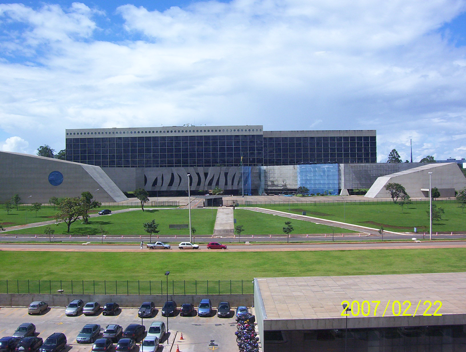 Vista externa da sede do Superior Tribunal de Justiça brasileiro.